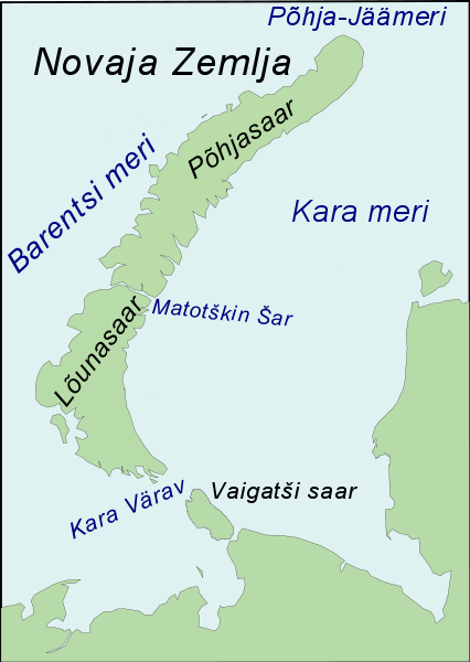 Novaja Zemlja kaart